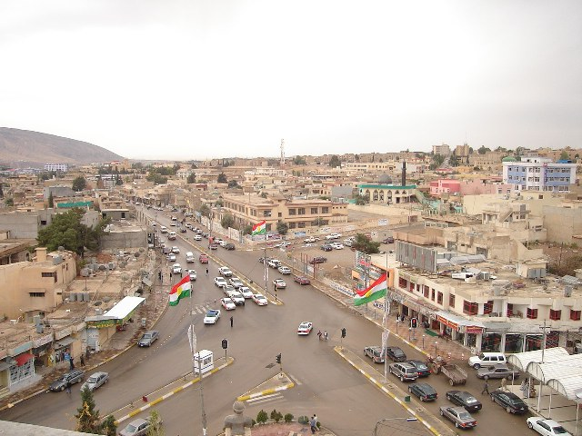 Foto van de centrum van Duhok. Genomen vanuit de lucht. Op de afbeelding is het Ehmedê-Xanê-kruispunt te zien.